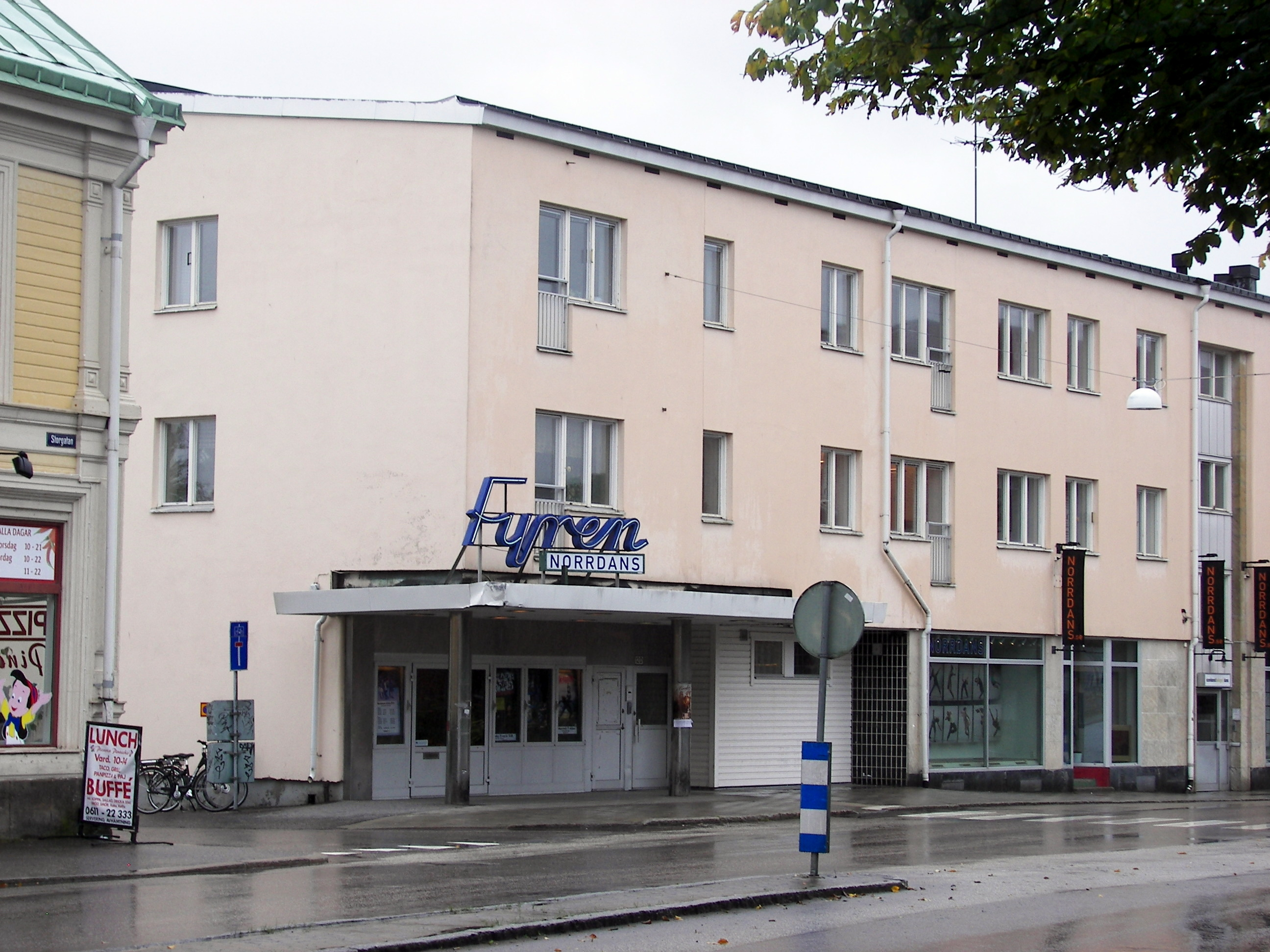 Fyren i Härnösand (Garvaren 6).